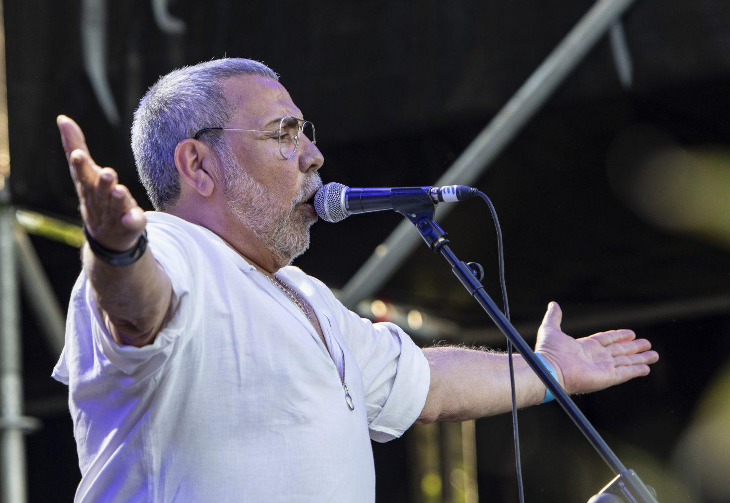 Los sonidos más rumberos se apoderaron ayer de la noche madrileña. Miles de personas abarrotaron los escenarios, a un lado y a otro del río.